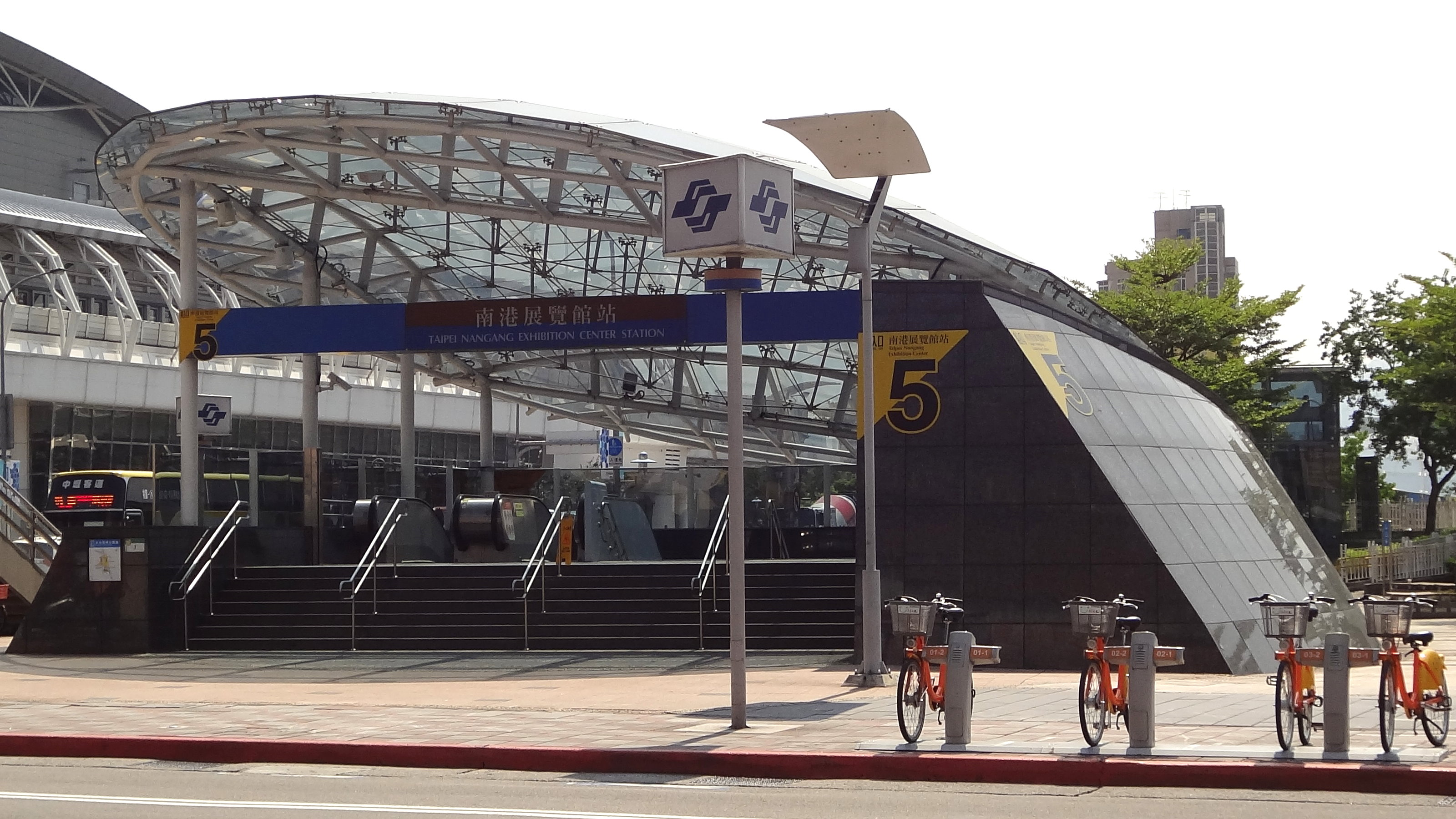 臺北捷運南港展覽館站5號出口。